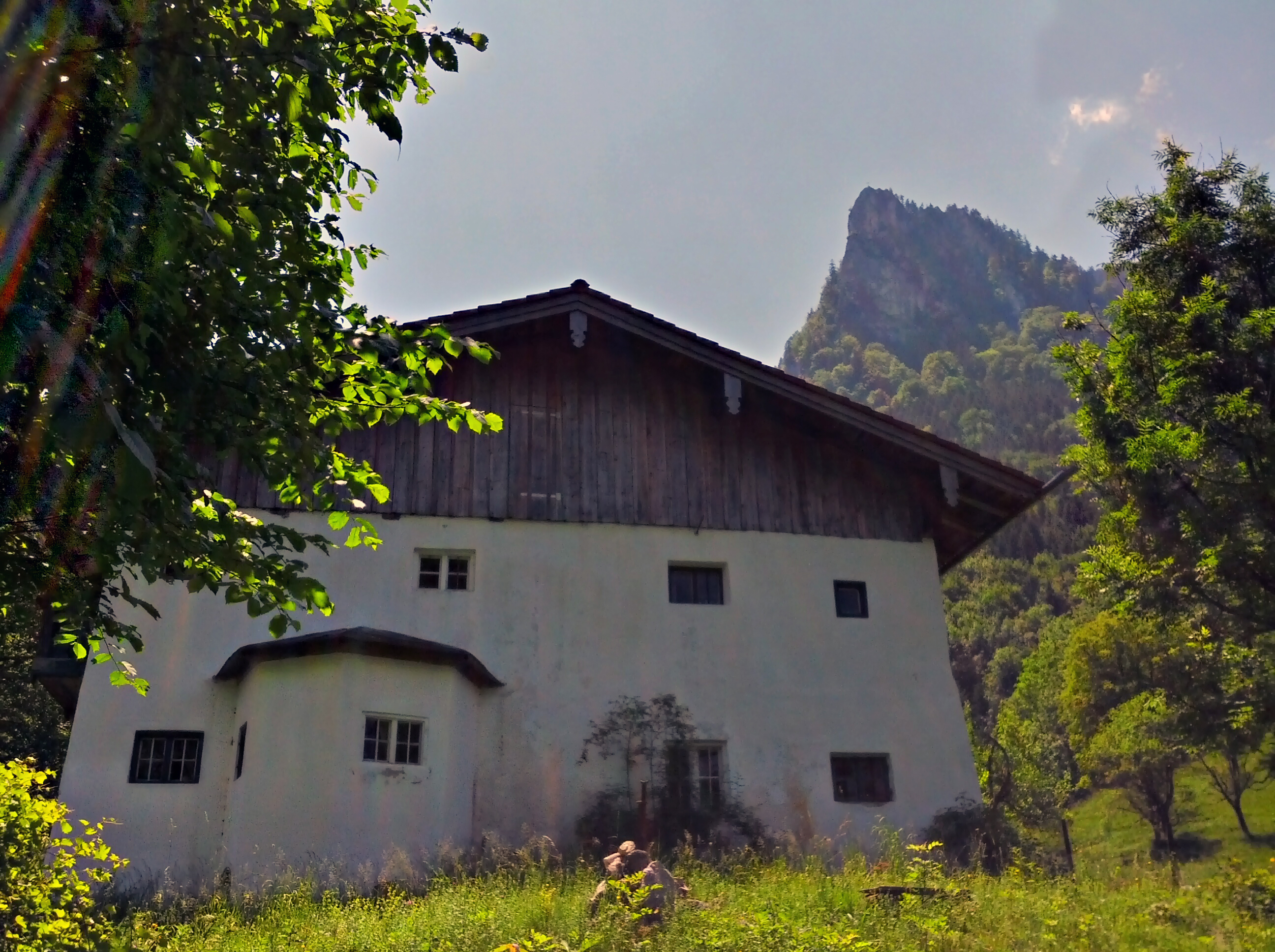 Maiwand bei Flintsbach, im Vordergrund das Gebäude "Wagner am Berg"